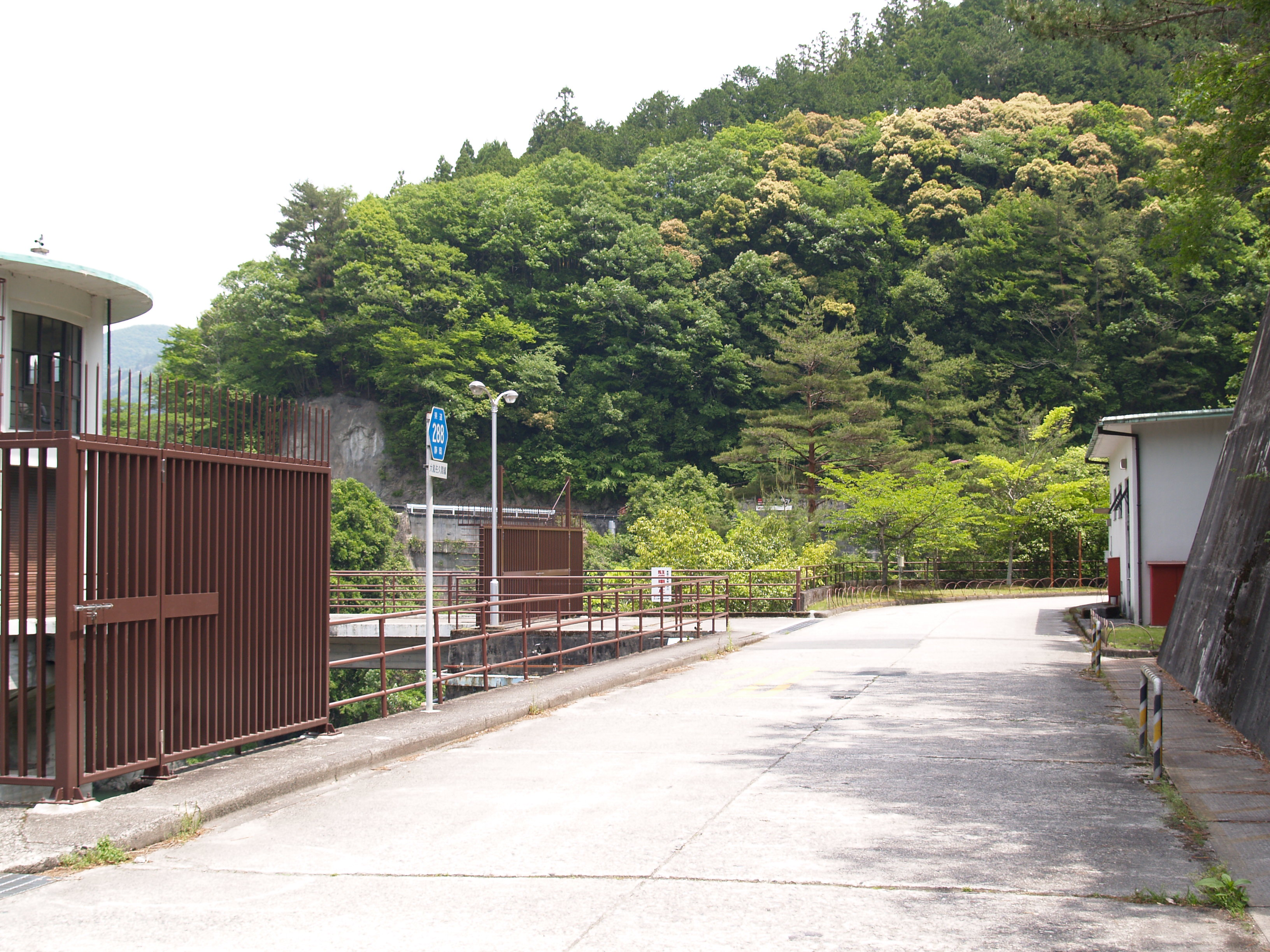 静岡県道288号大嵐佐久間線（佐久間電力館付近にて）